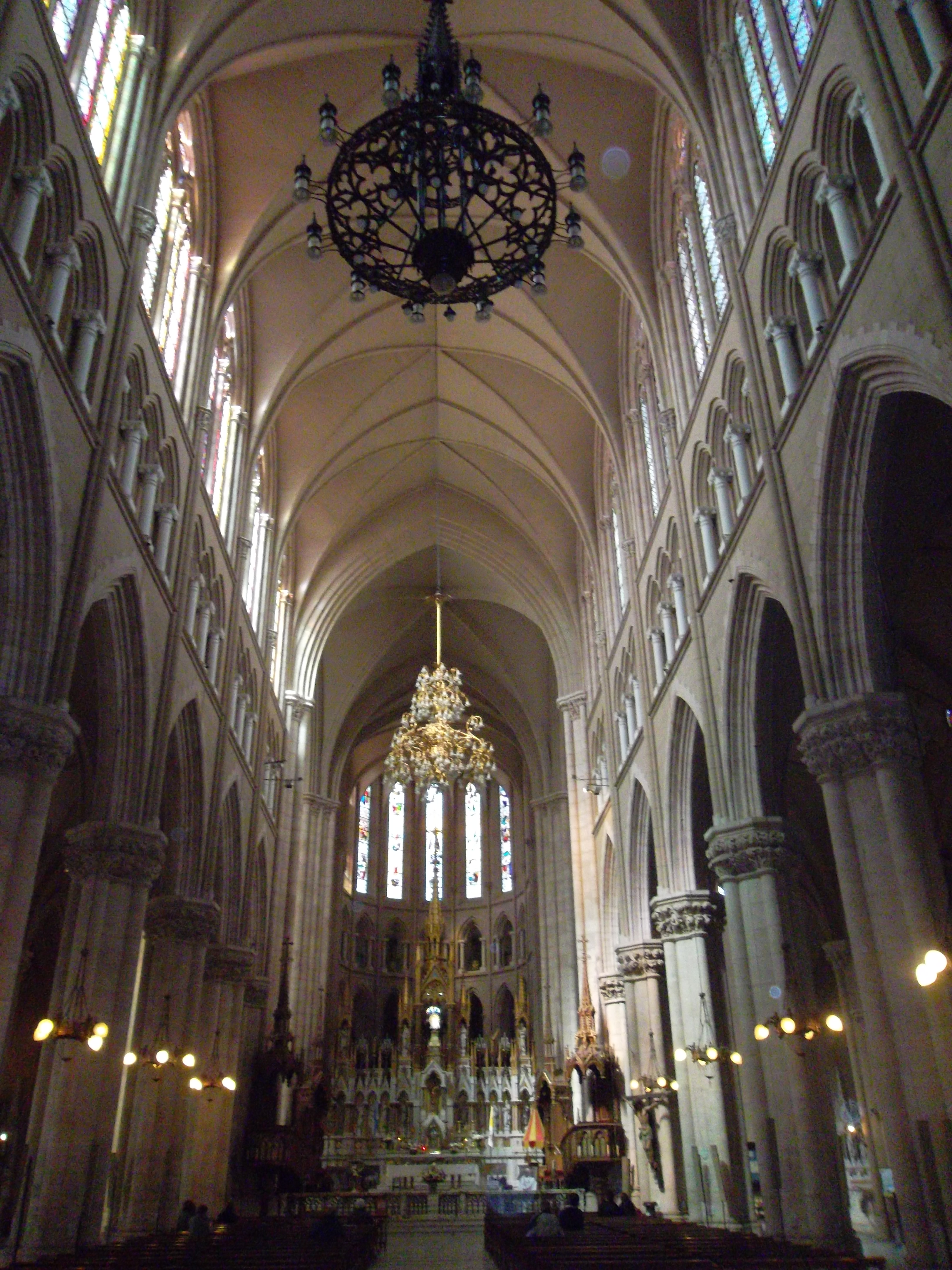 Nave central de la Basílica